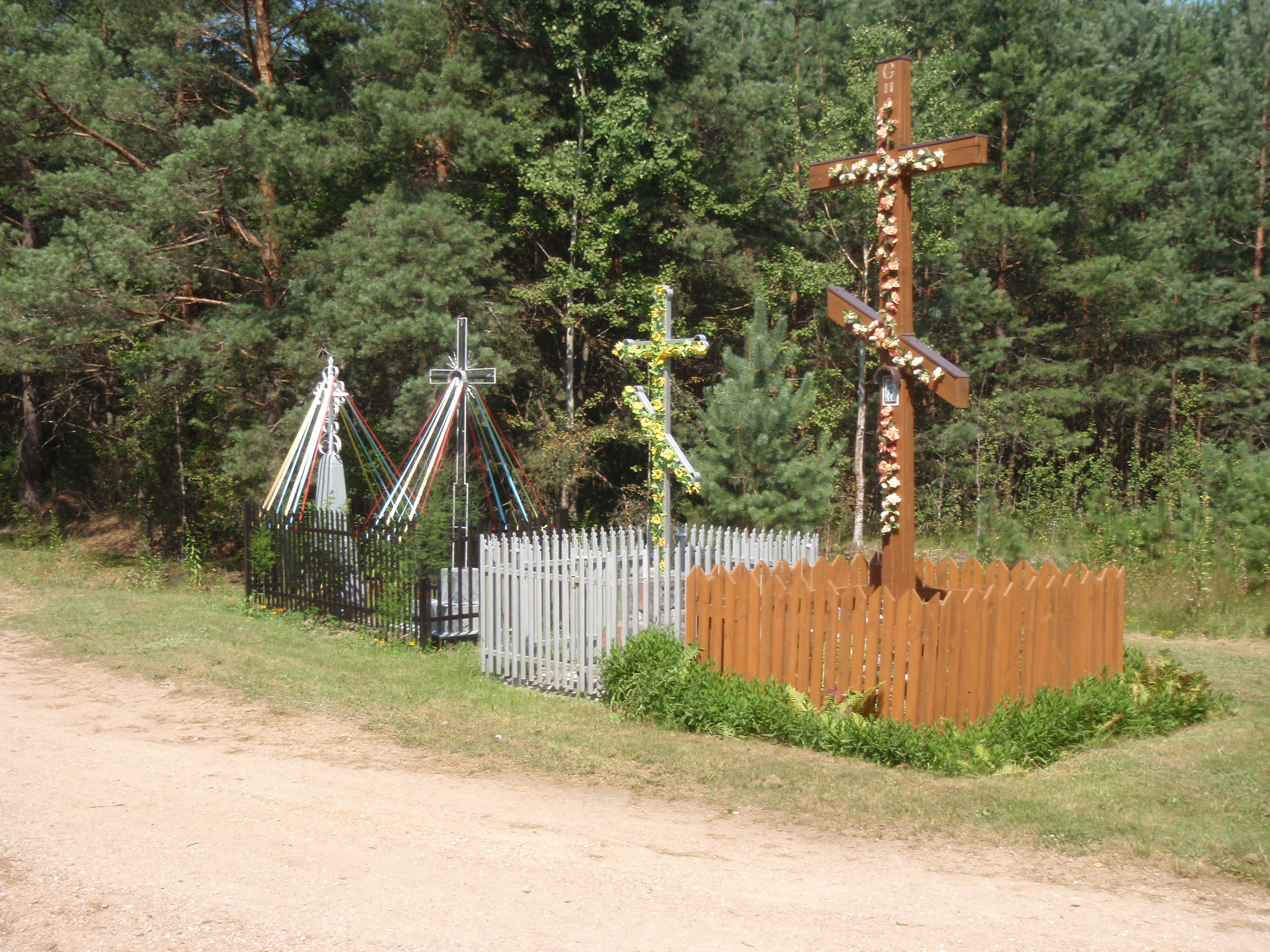 wjazd do wsi Rybaki (gmina Narew) - krzyże katolickie i prawosławne obok siebie